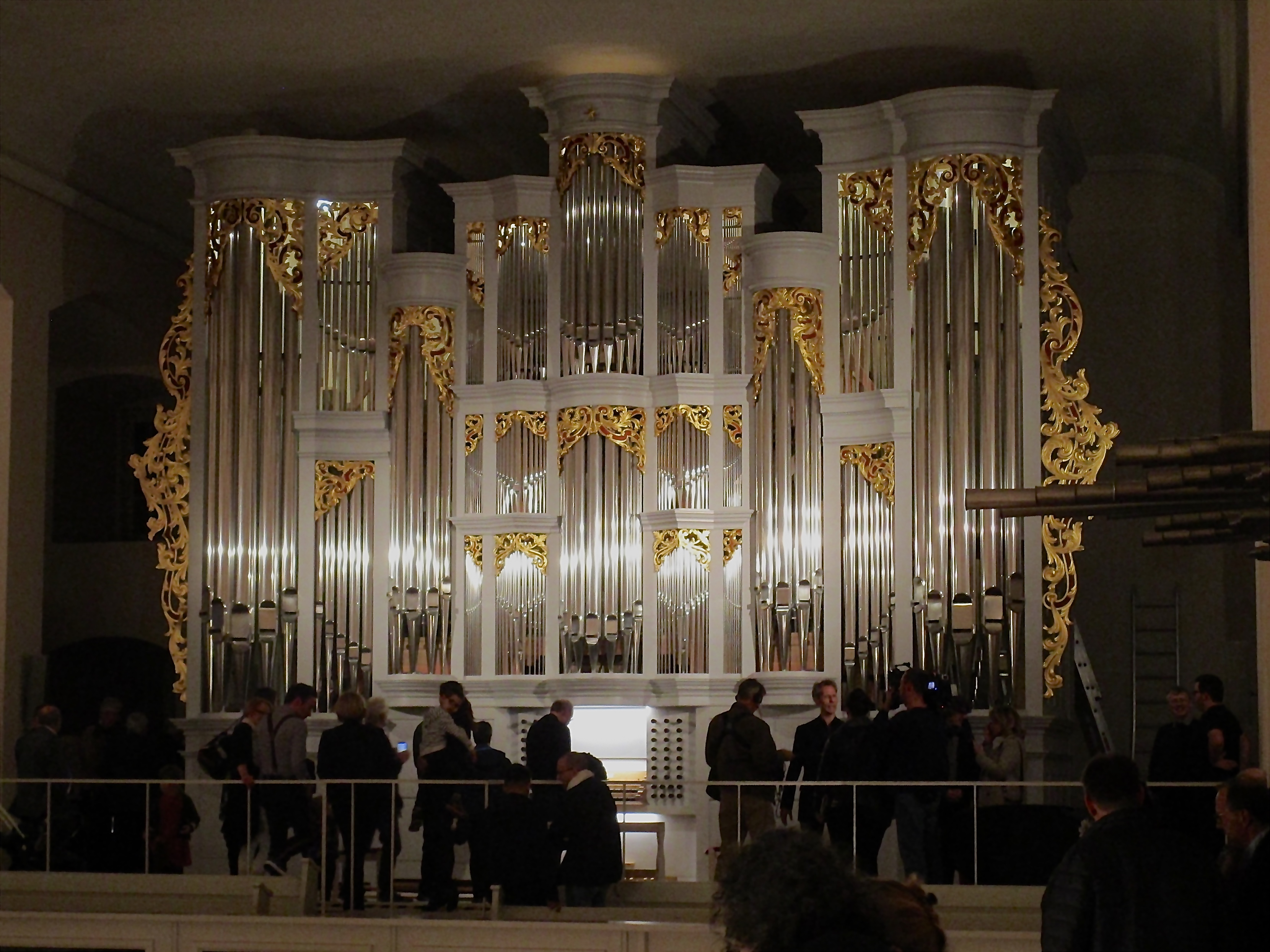 Die Neustädter Hof- und Stadtkirche St. Johannis bekam im Jahr 2019 zusätzlich zur Spanischen Orgel (s. auch Spanische Trompete) eine neue Orgel des belgischen Orgelbauers Dominique Thomas (siehe Orgeln der Neustädter Kirche (Hannover)), die im Eigentum des Landes Niedersachsen steht, denn sie ist ein von Bund und Land je zur Hälfte finanziertes Instrument zur Ausbildung von Studentinnen und Studenten des Studiengangs Kirchenmusik der Hochschule für Musik, Theater und Medien Hannover. Nach dem zwischen Land Niedersachsen und Kirchengemeinde geschlossenen Vertrag steht die Orgel der Musikhochschule 40 Stunden in der Woche für die Ausbildung der Studierenden zur Verfügung. Die neue Orgel wurde am 26. Oktober 2019 von Orgelprofessor Emmanuel Le Divellec (Musikhochschule Hannover) mit einem reinen Programm von Orgelmusik von Johann Sebastian Bach der Öffentlichkeit vorgestellt. Auf dem Foto ist Le Divellec nach dem Konzert rechts zu sehen, er wendet sich der Videokamera zu.